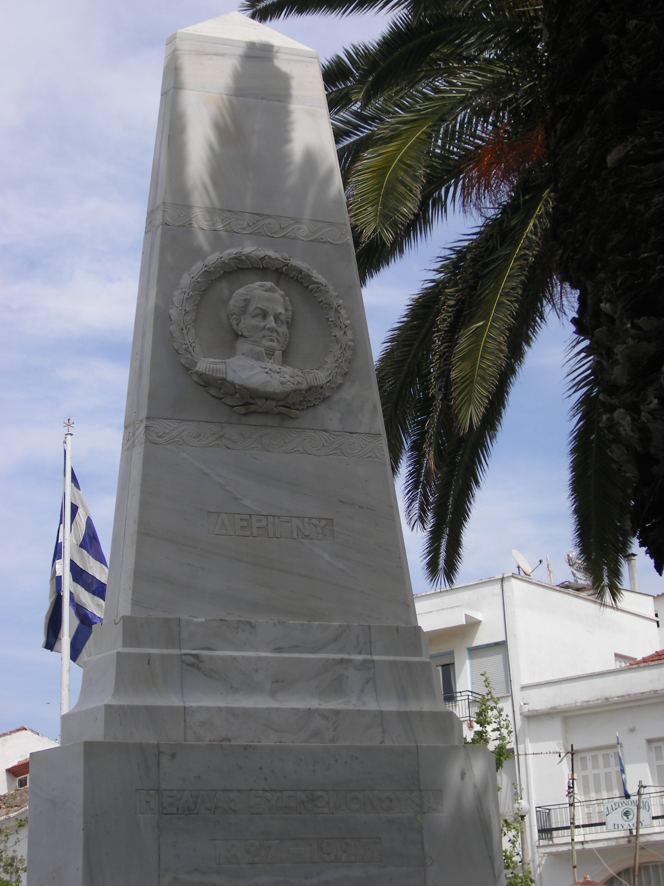 Monument commémoratif / Memorial (Pylos). Hommage à de Rigny.